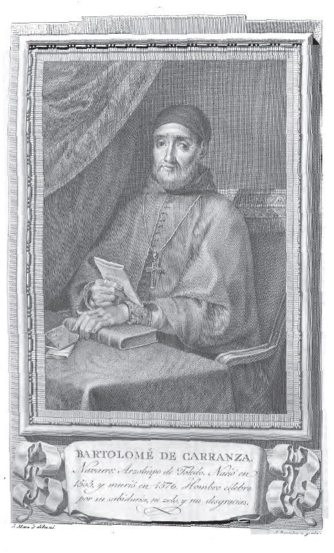 Retrato de Bartolomé de Carranza.